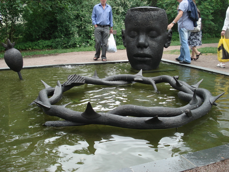 konstverket Källa Astrid av Berit Lindfeldt i trädgården på Astrid Lindgrens barndomsgård Näs. Statyn kallas i folkmun för Sagornas Död.